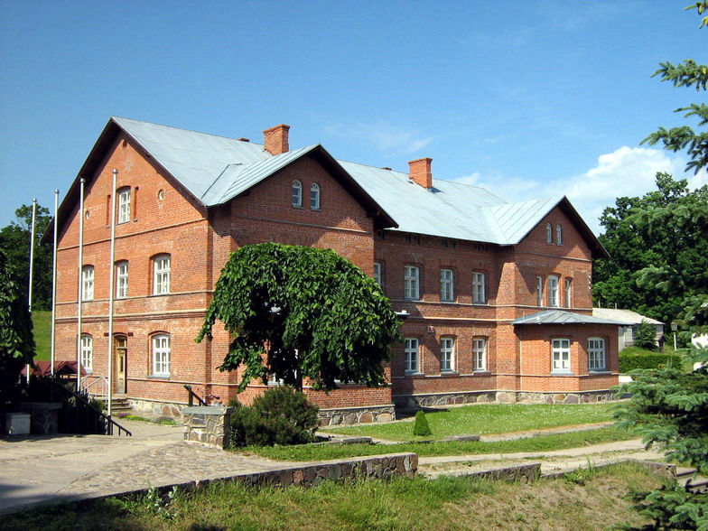 Rietavas, Rietavo Oginskių kultūros istorijos muziejus Foto: Algirdas, 2007-06-12